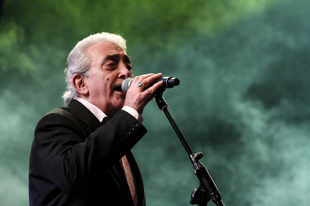 Carlos Goberna director y fundador de banda uruguaya Sonora Borinquen.